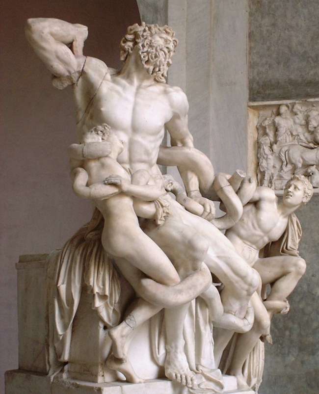 English Description: Laocoon group, by Hagesandros, Athanadoros and Polydoros, Rhodian artists, c. 170–150 BC. Marble. Location: Laocoon chamber, Octogon court, Pio-Clementino Museum, Vatican. French Description : groupe du Laocoon, par Hagesandros, Athanadoros et Polydoros, sculpteurs rhodiens, vers 175-150 av.J.-C. Nature du support : marbre Dimensions : hauteur : 2,42 m Localisation : cabinet du Laocoon, cour de l'Octogone, musée Pio-Clementino, Vatican